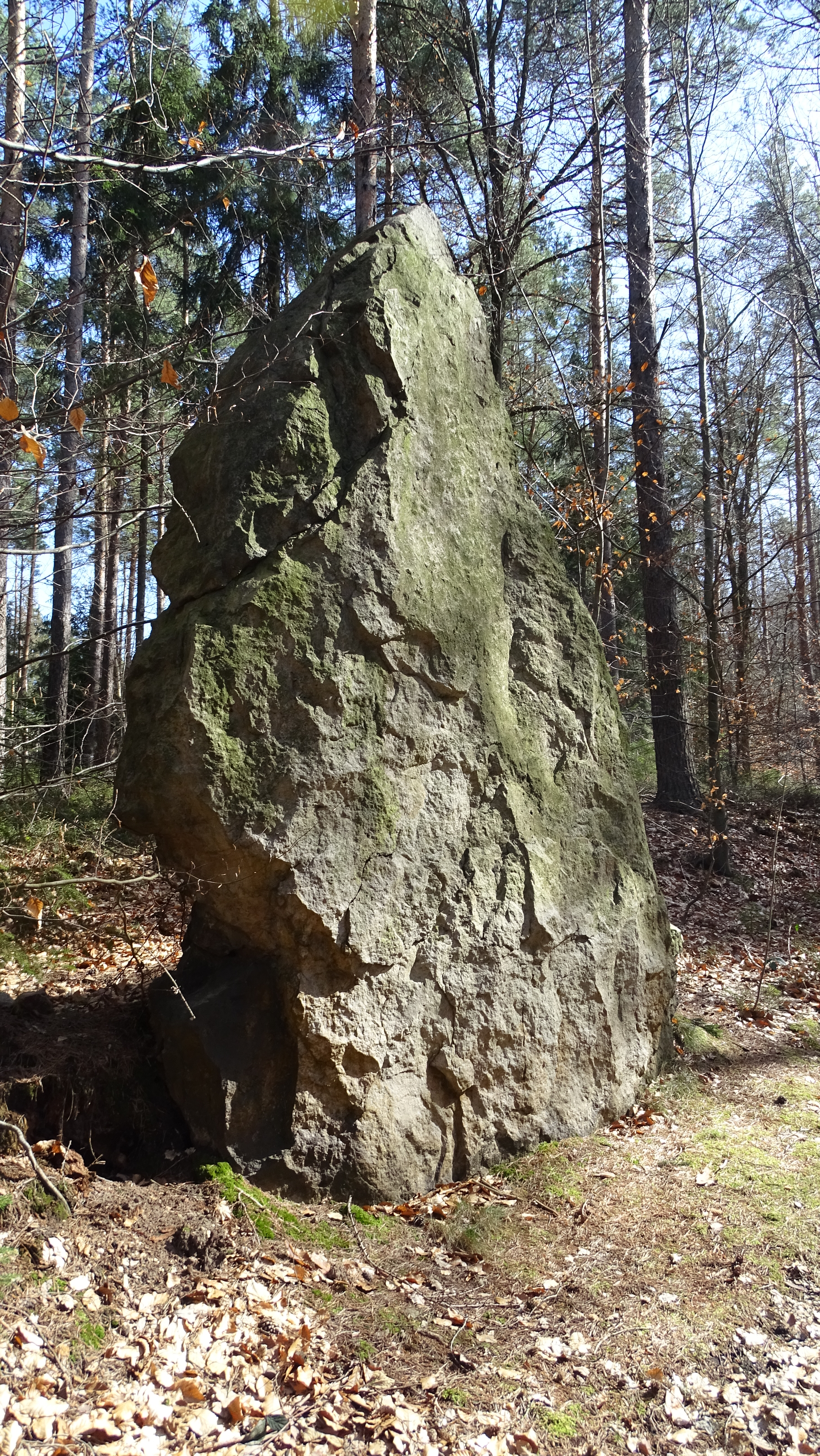 Menhir in Waldeck (Thüringen)